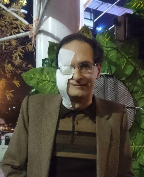 علیرضا رجایی